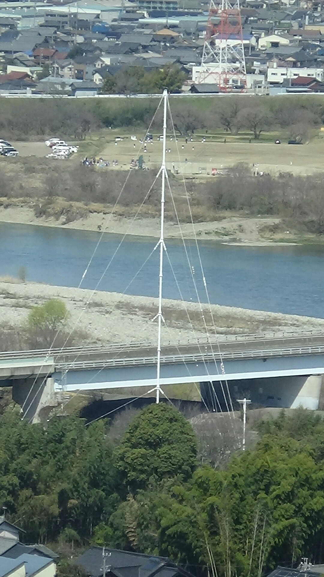 CBCラジオ岐阜中継局をツインアーチ138（愛知県一宮市）より望む